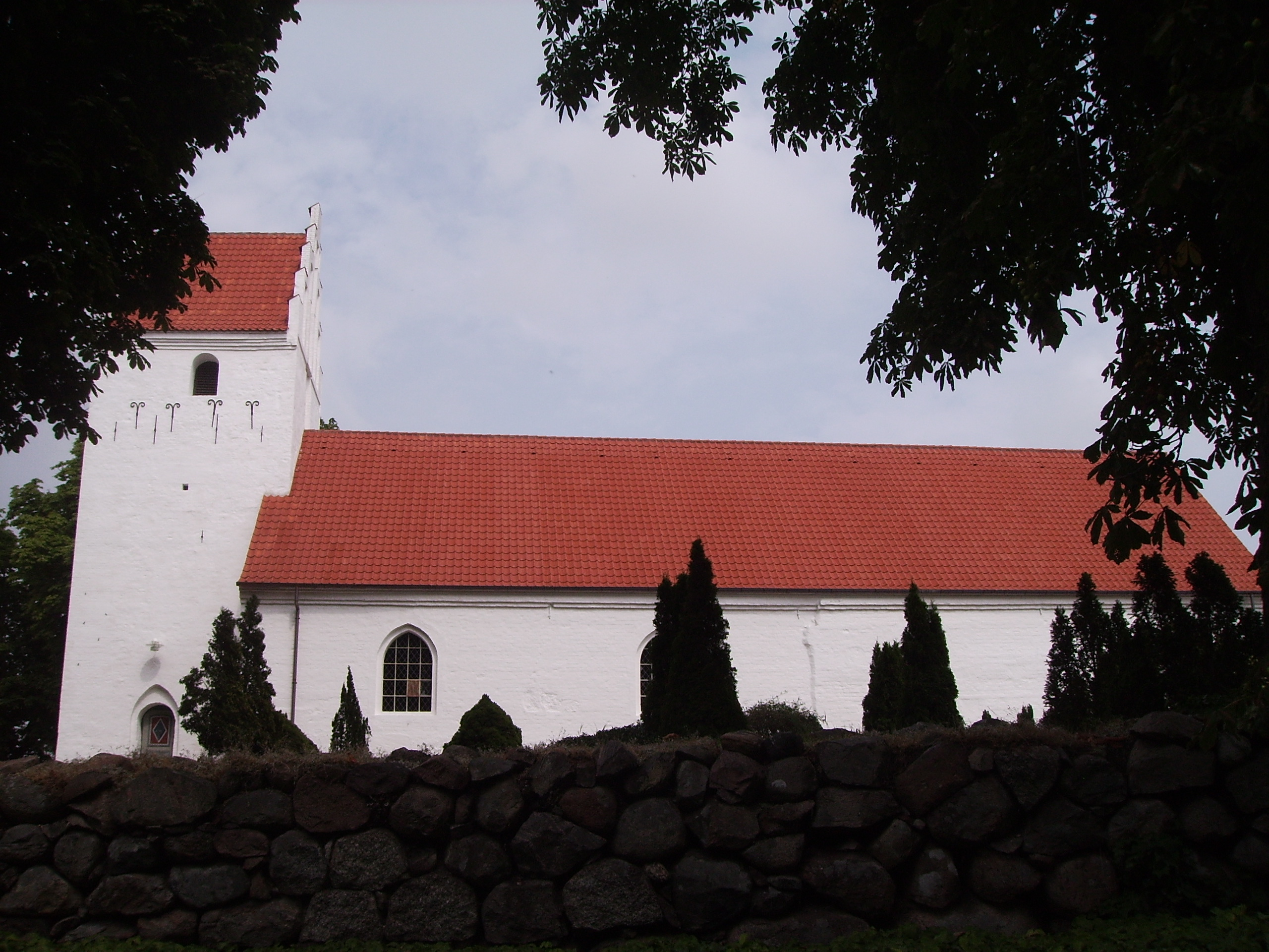 Åsum Kirke, Åsum Sogn, Åsum Herred, Odense Amt, Denmark (Danish Church)